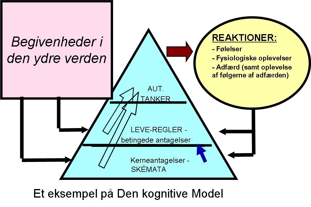 Den kognitive model